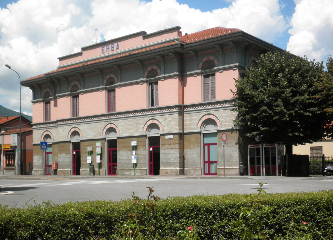 Stazione ferroviaria di Erba.